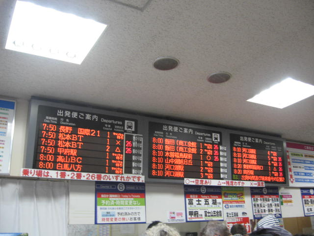 新宿高速バスターミナル建物内にある発車標